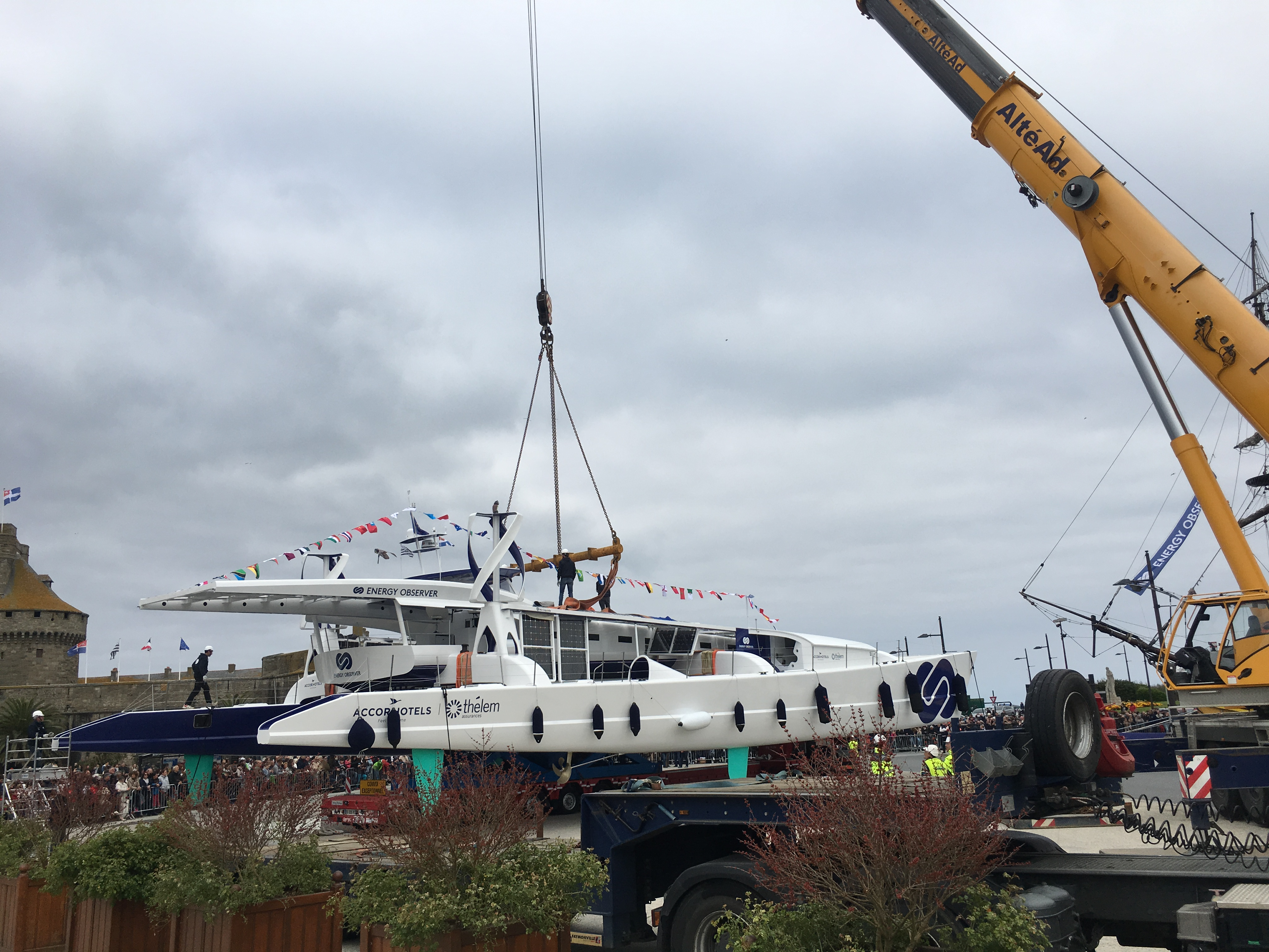 Bâteau Energy Observer quelques minutes avant sa mise à l'eau dans le port de Saint-Malo, France.